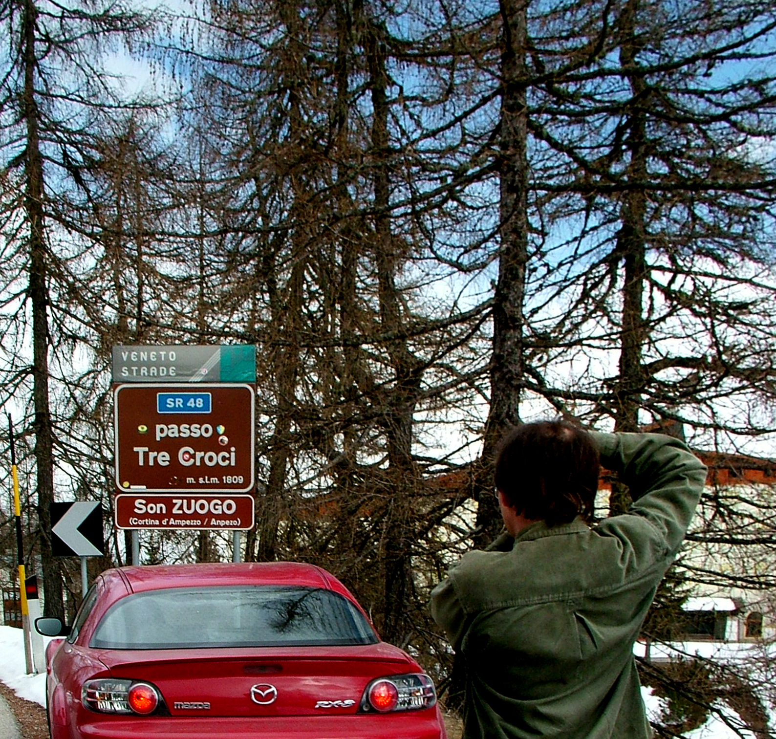 Tre Croci-hágó (Passo Tre Croci) télen, Olaszország